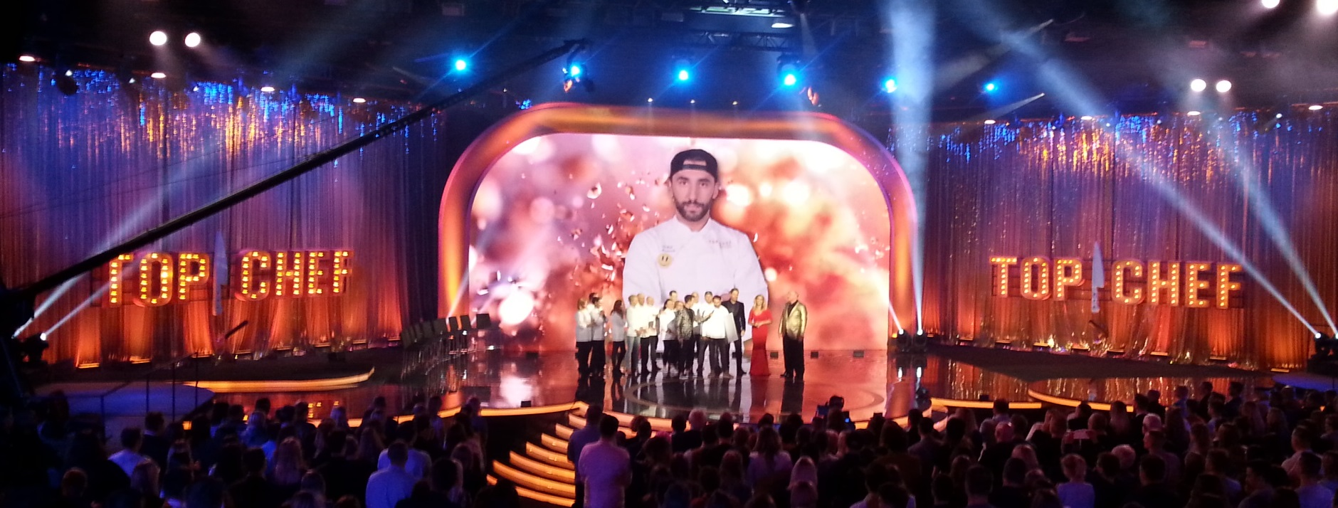 Scena programu "Top Chef. Gwiazdy od kuchni"